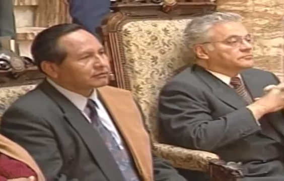 Gonzalo Sanchez de Lozada y Victor Hugo Cardenas en 1993